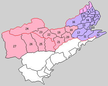 徳島県那賀郡の町村制時点の町村。